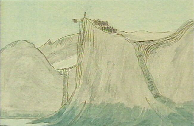 pisissarfik